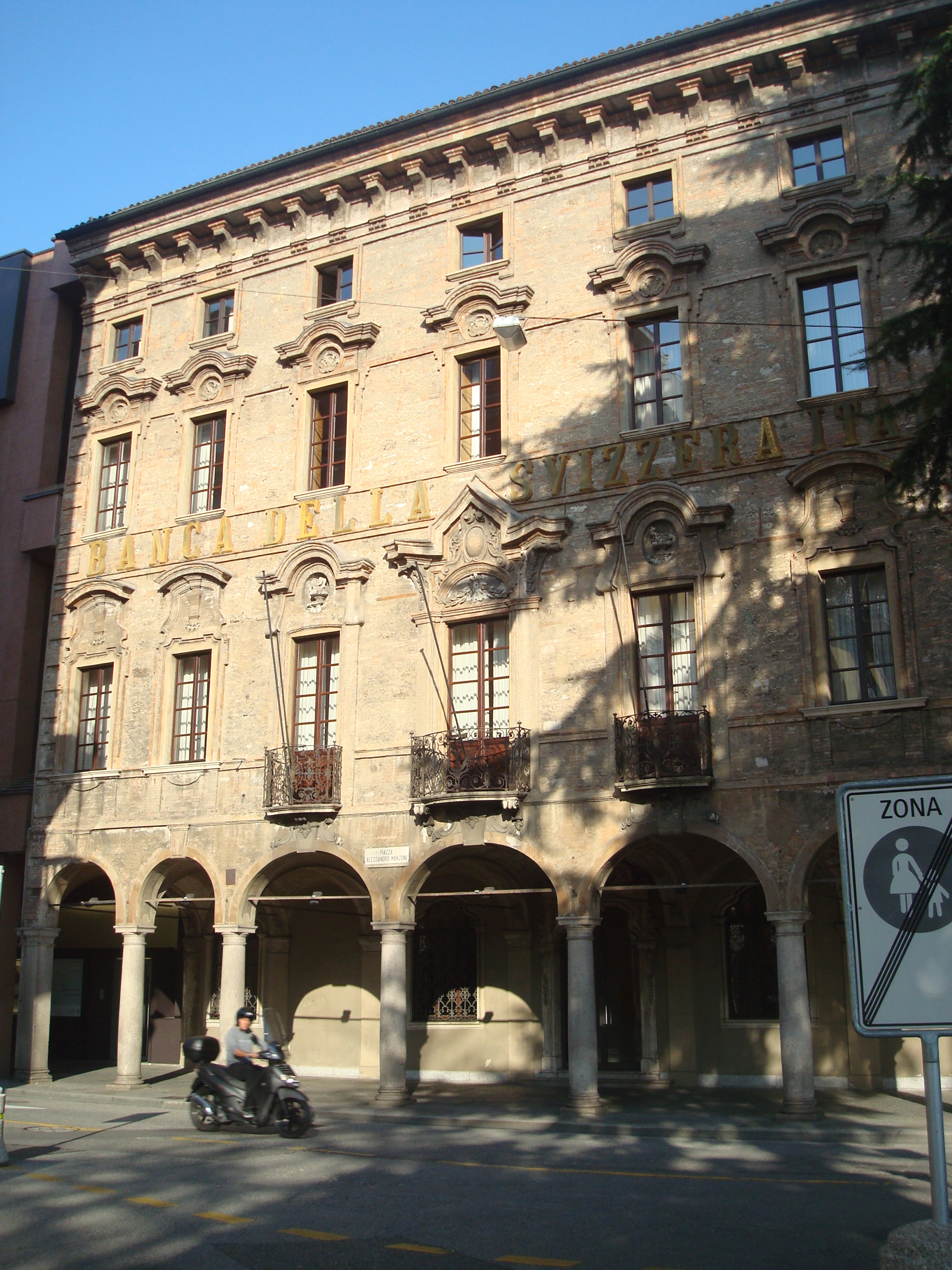 Palazzo Riva, Via Massimiliano Magatti 2, à Lugano, canton du Tessin, Suisse - siège de la banque de la Suisse Italienne